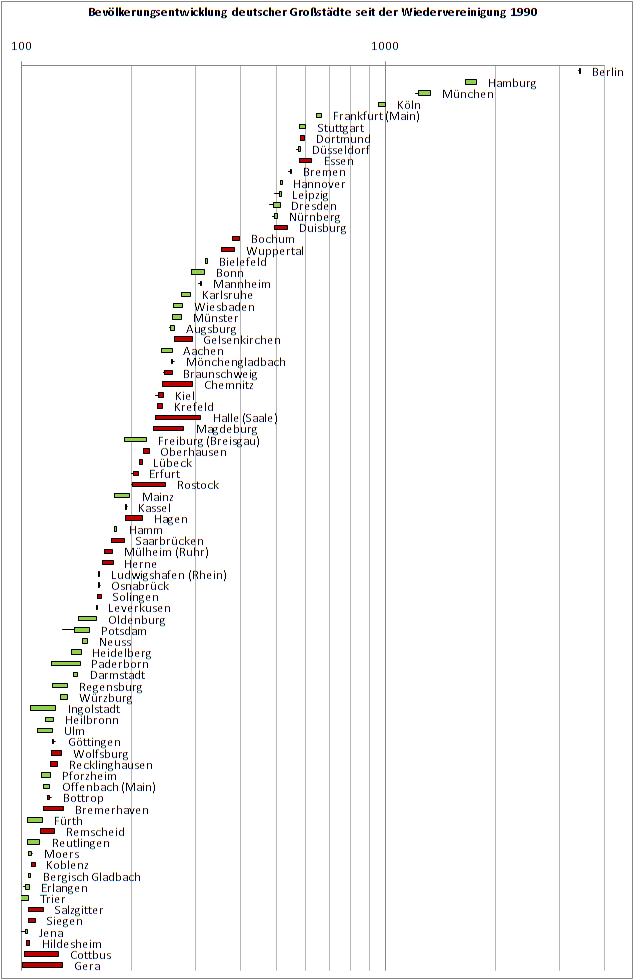 Bevölkerungsentwicklung deutscher Großstädte von 1990 bis 2008, mit Minimum und Maximum (allerdings nur 2000 als weiterer Wert vorhanden)